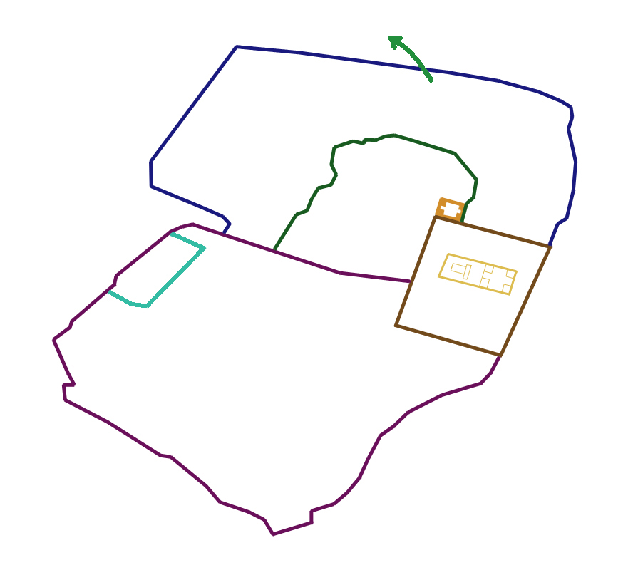 ירושלים 70 - הגיחה ממגדלי הנשים